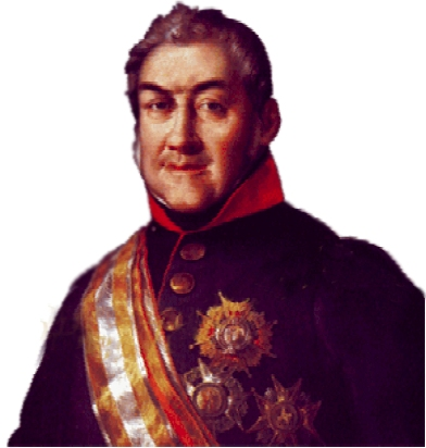 José María Santocildes